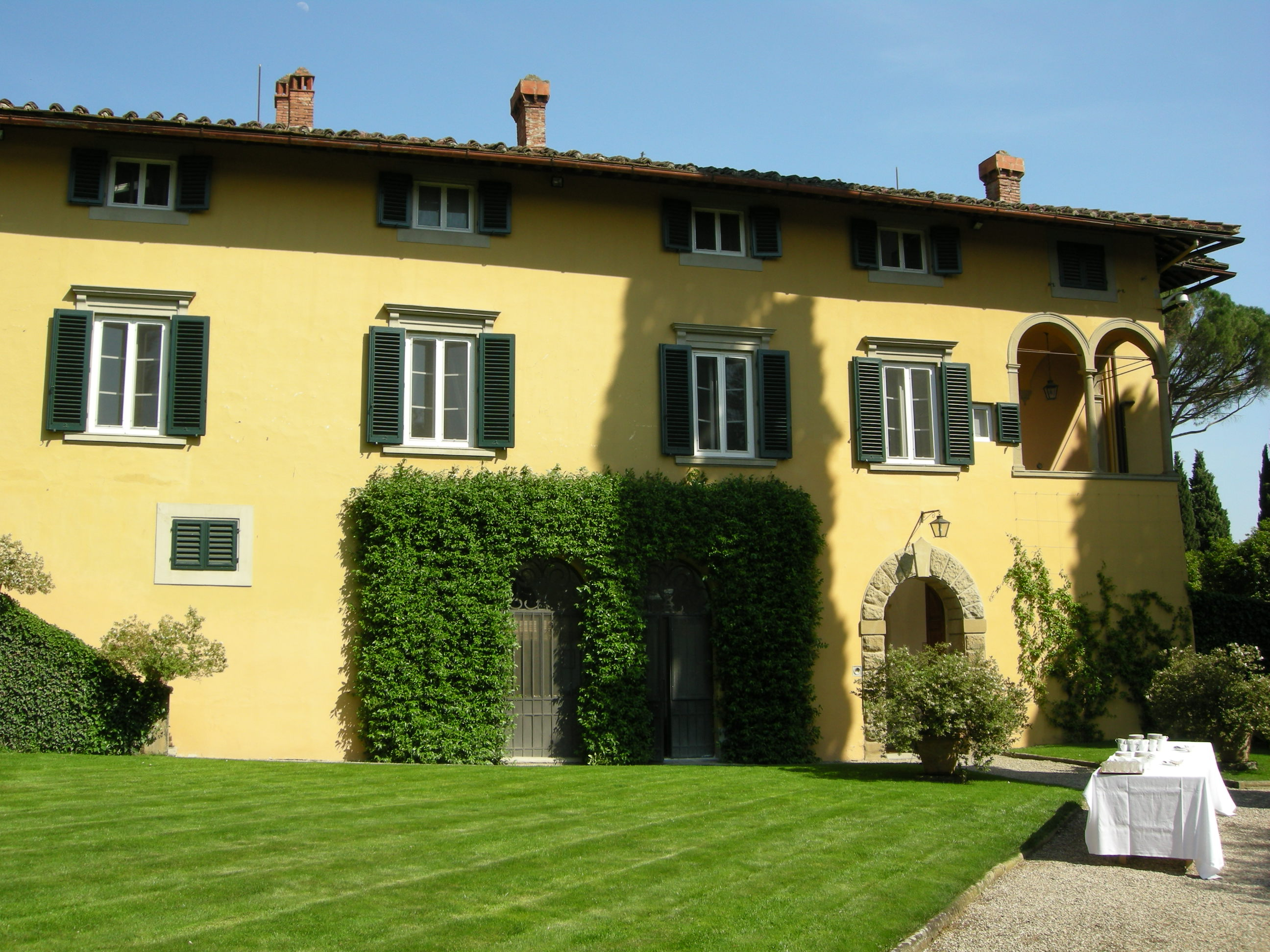 Villa i tatti, facciata ovest